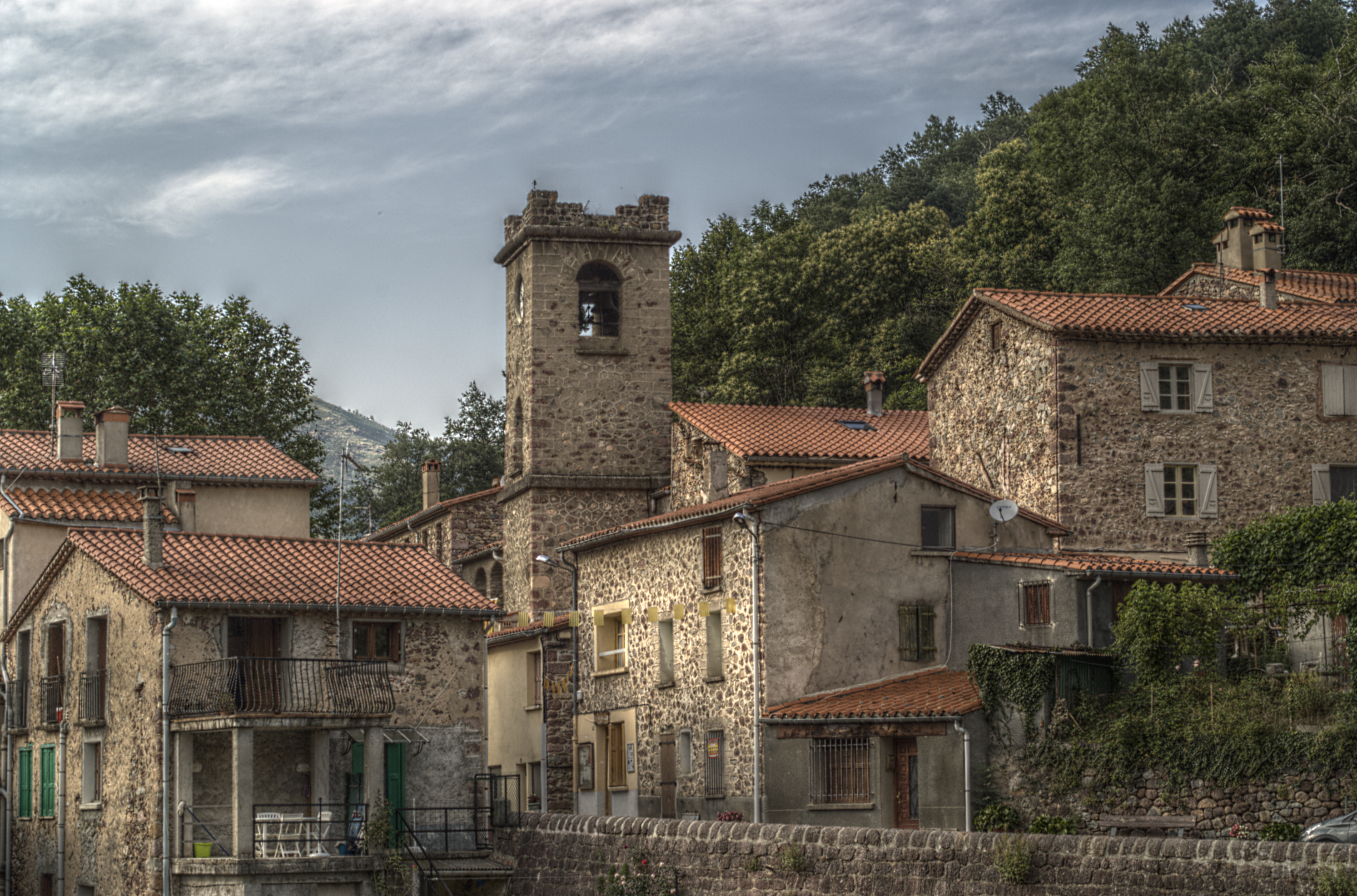 Vue général du village et clocher de l'église Saint-Sauveur, Lamanère (Pyrénées-Orientales, Languedoc-Roussillon, France)